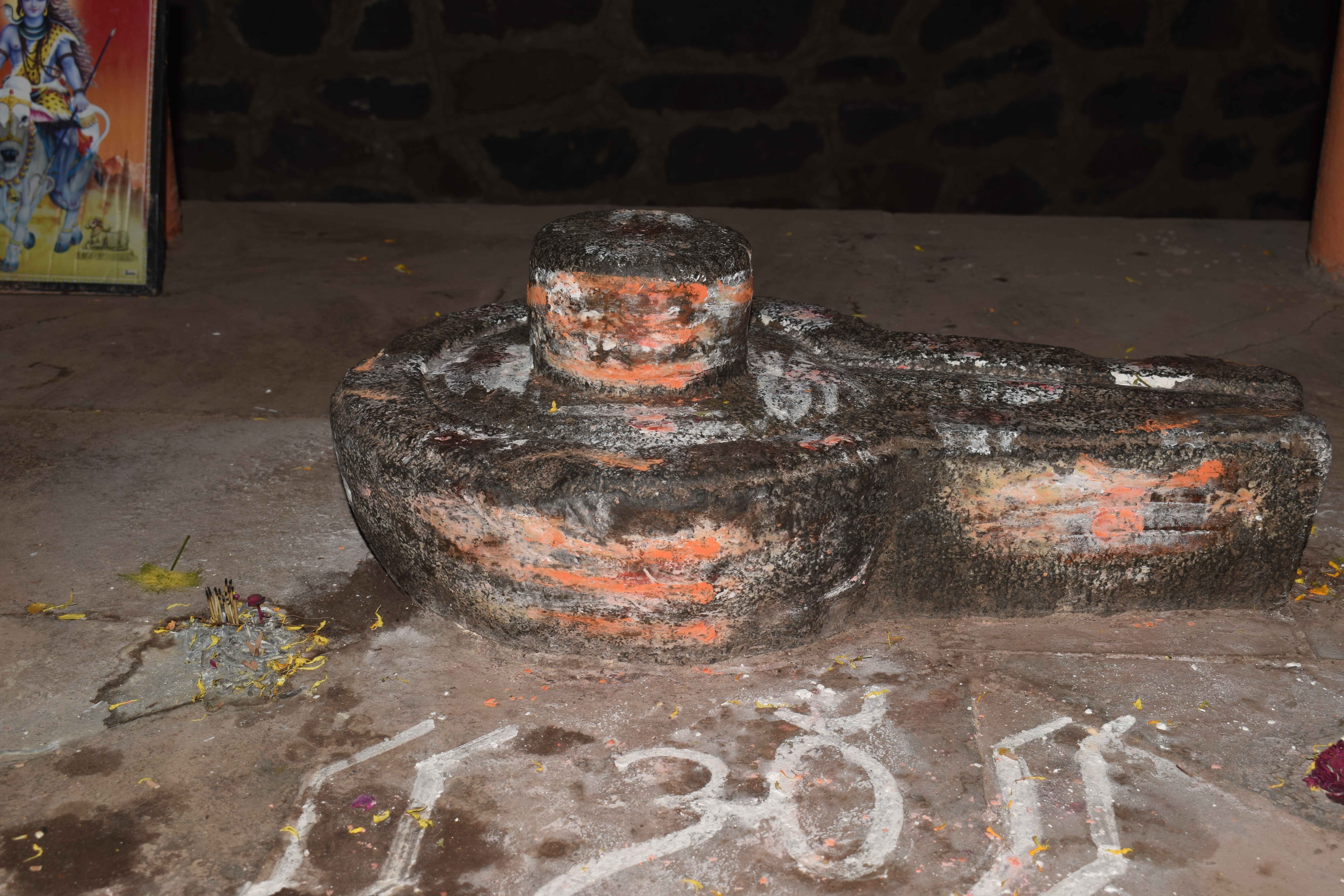 श्री तेलेश्वर लिंग